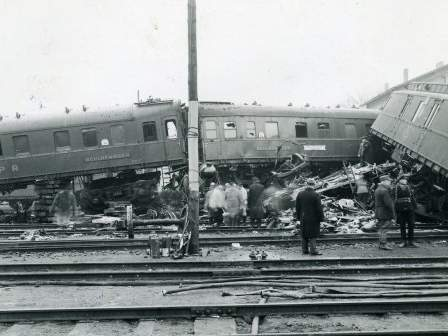 In der Nacht zum 22. Dezember 1939 rasten zwei D-Züge in Genthin ineinander. 278 Menschen starben, 453 wurden verletzt.